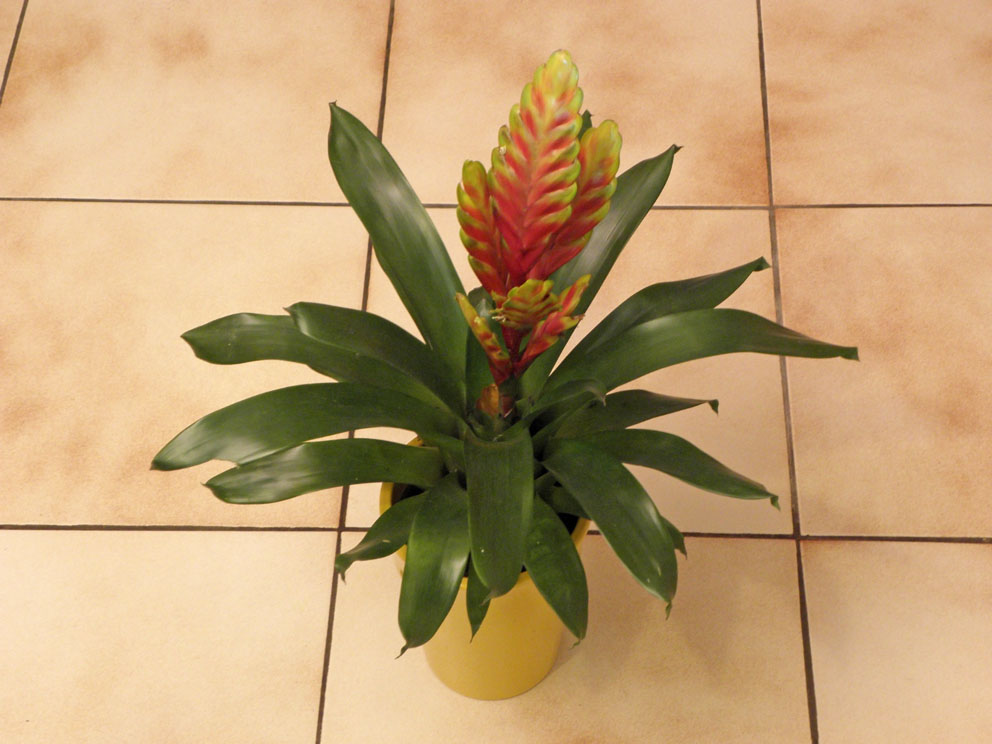 Vriesea Cultivar